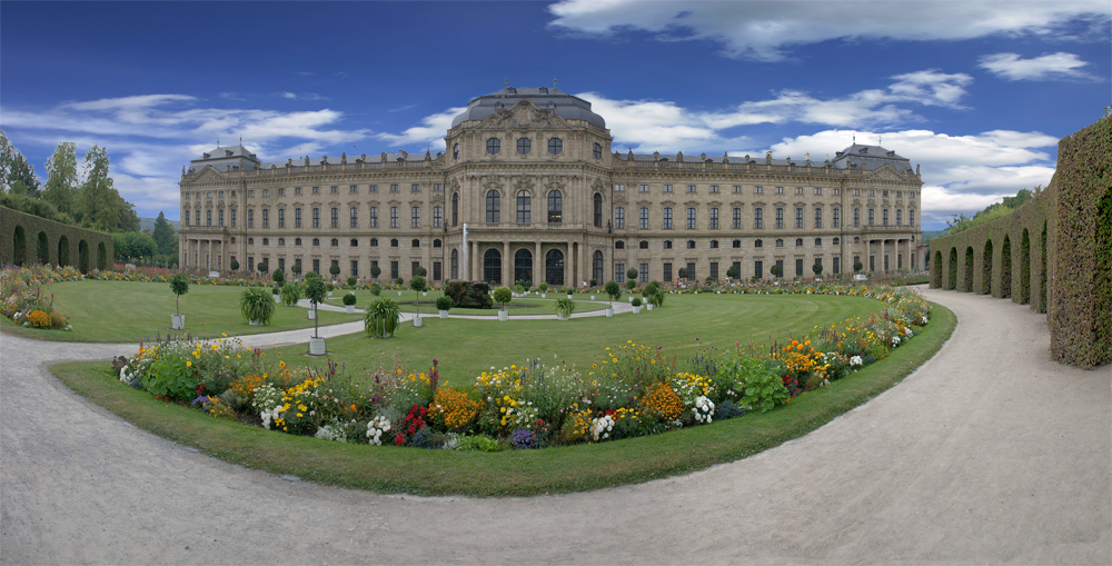 Fürstbischhöfliche Residenz zu Würzburg, Unesco Weltkulturerbe